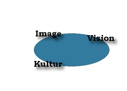 Illustration til corporate branding